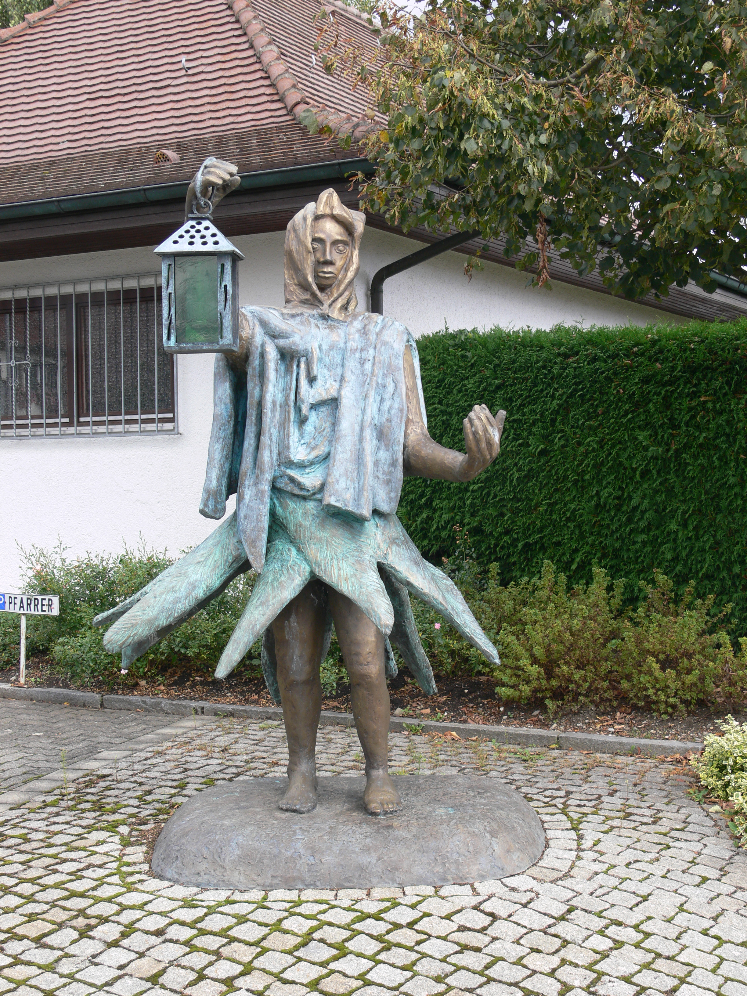 Boos, Gemeinde Ebersbach-Musbach, Landkreis Ravensburg Diane Herzogin von Württemberg: Skulptur "Der Engel mit der Laterne" (Leihgabe der Künstlerin) Text auf dem begleitenden Schild: „Der Engel mit der Laterne leuchtet und führt Dich auf Deinem Weg damit die Tücken des Lebens dich nicht aus dem Gleichgewicht bringen.“